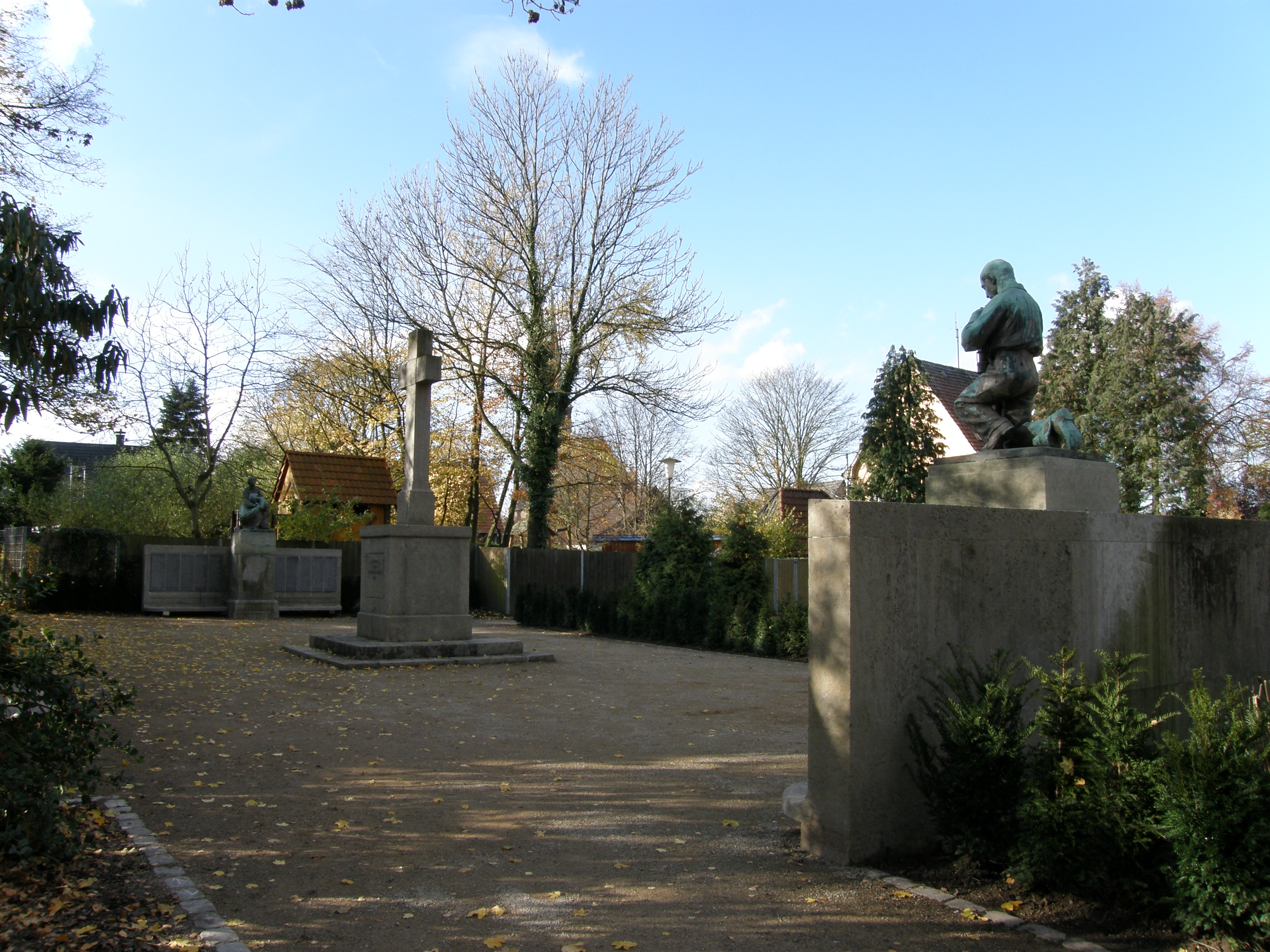 Übersicht über die Gedenkstätte Zeche Radbod